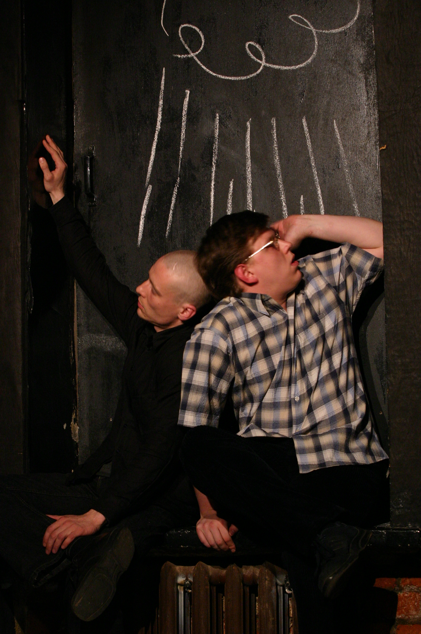 Автор фото: Владимир Луповской Театр.doc Москва, 2004 Спектакль "Пять - двадцать пять" по пьесе Д.Егорова. Режиссёр Антон Коваленко На фото артисты Сергей Лавыгин (МТЮЗ) в роли Толстого и Антон Коваленко в роли Пандуса